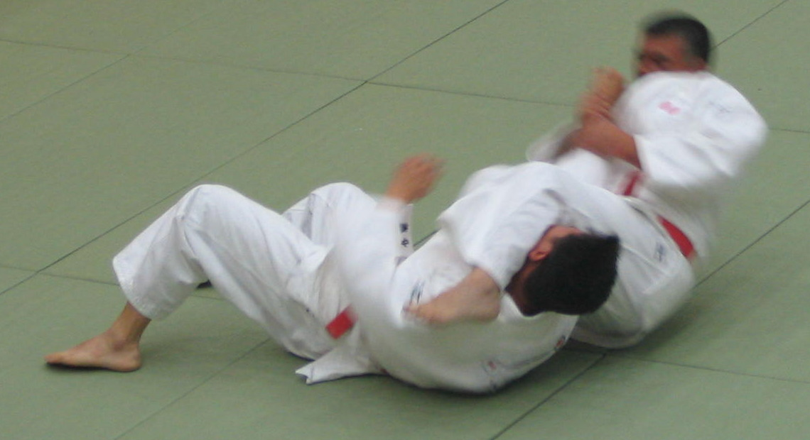 juji gatame in katamenokata